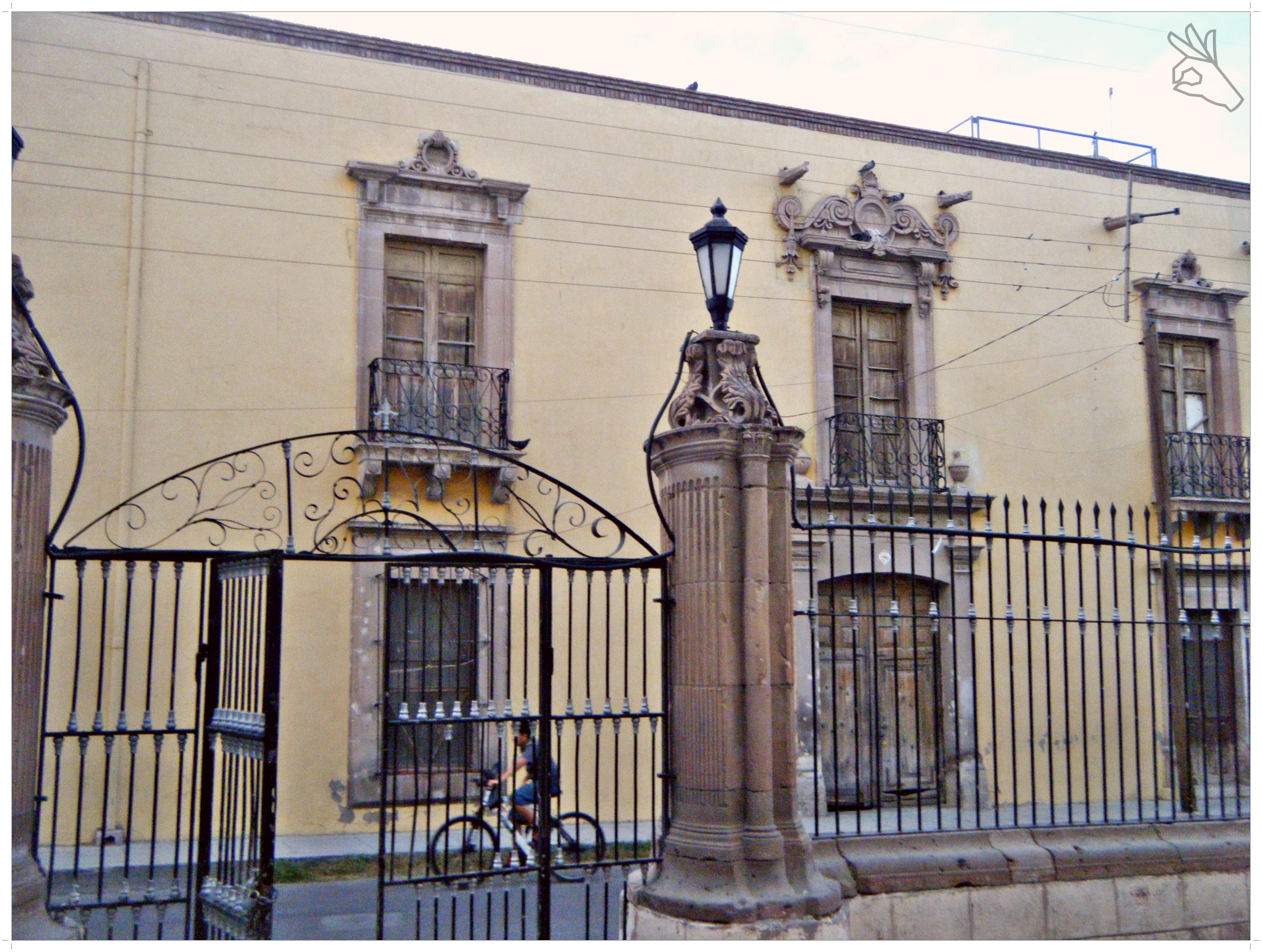 old house